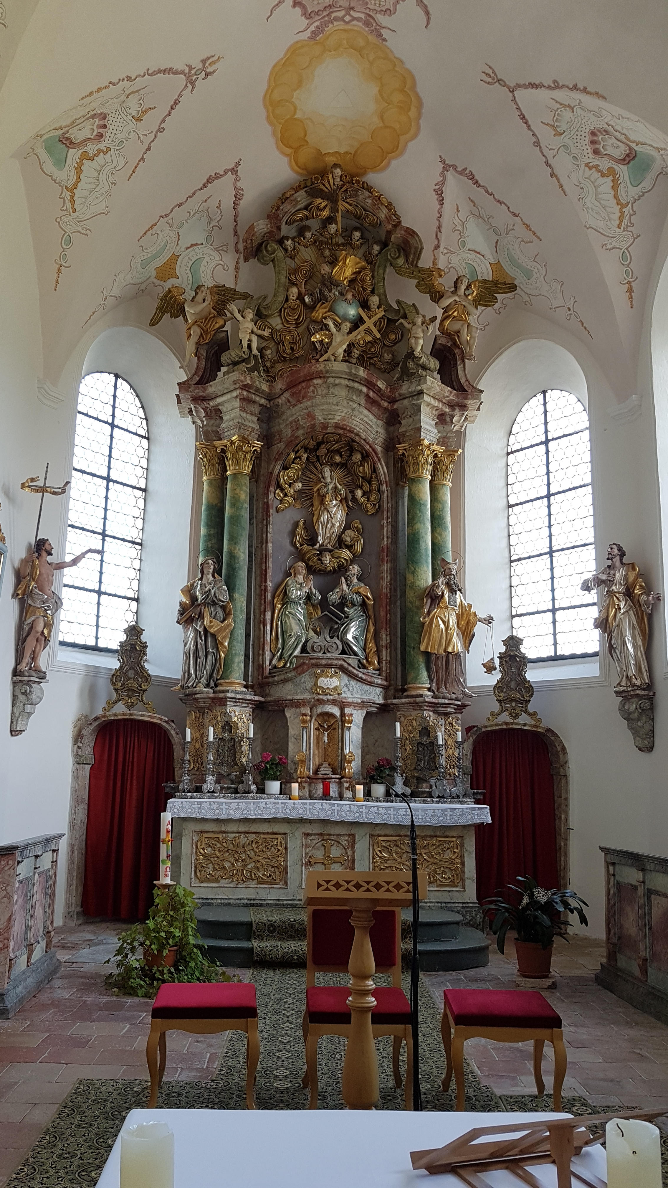 Burggen, Filialkirche St. Anna